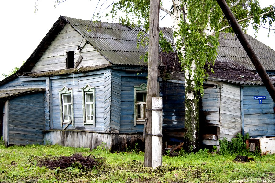 Обычный жилой дом в селе Осиновка, Ставропольский район Самарской области